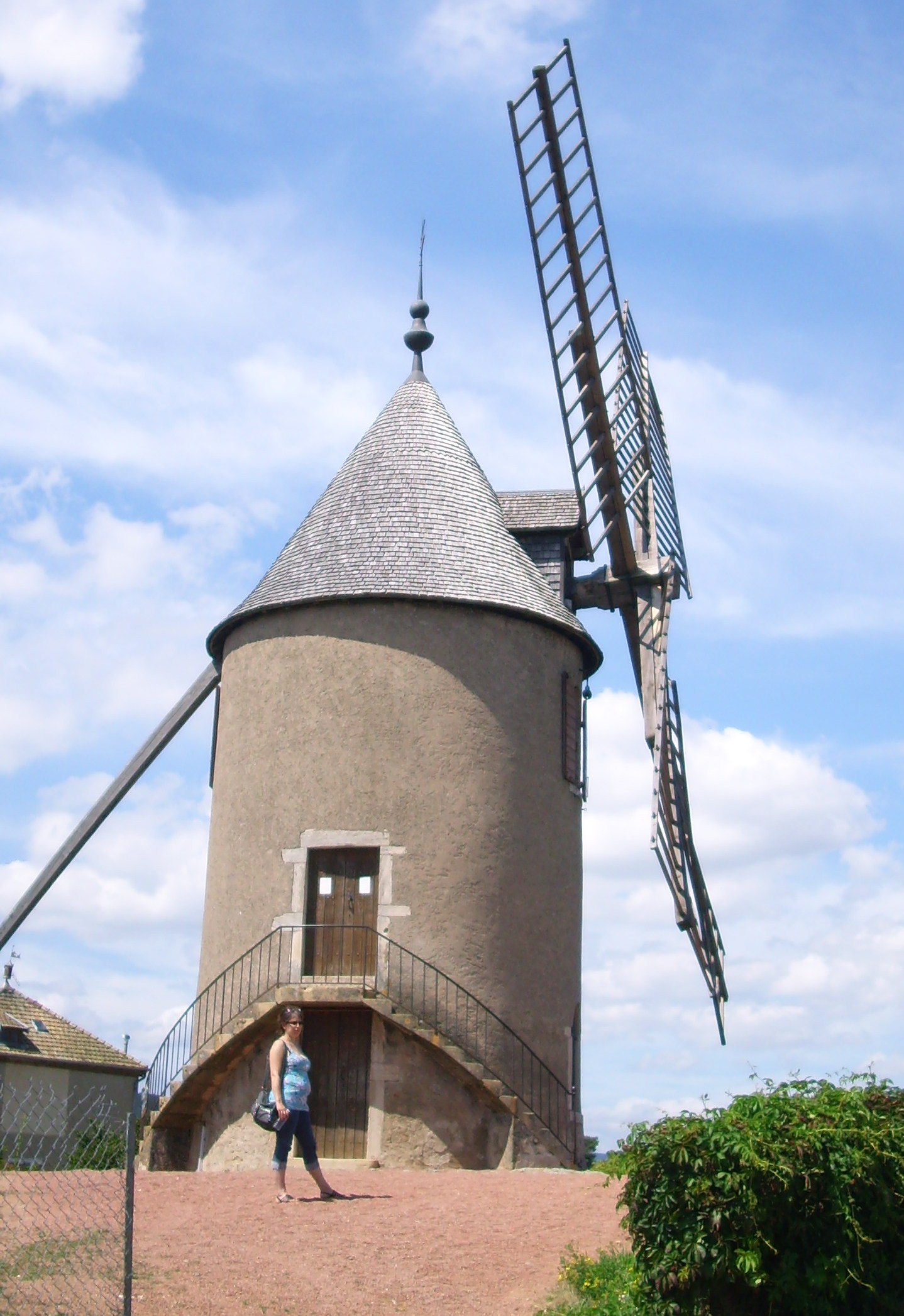 Le Moulin-à-Vent de l'appelation Moulin-à-Vent (69)